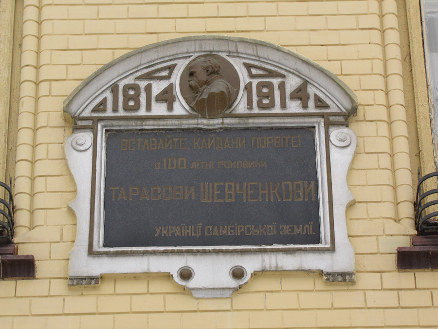 Присвята на честь 100-річчя з дня народження Шевченка у Самборі